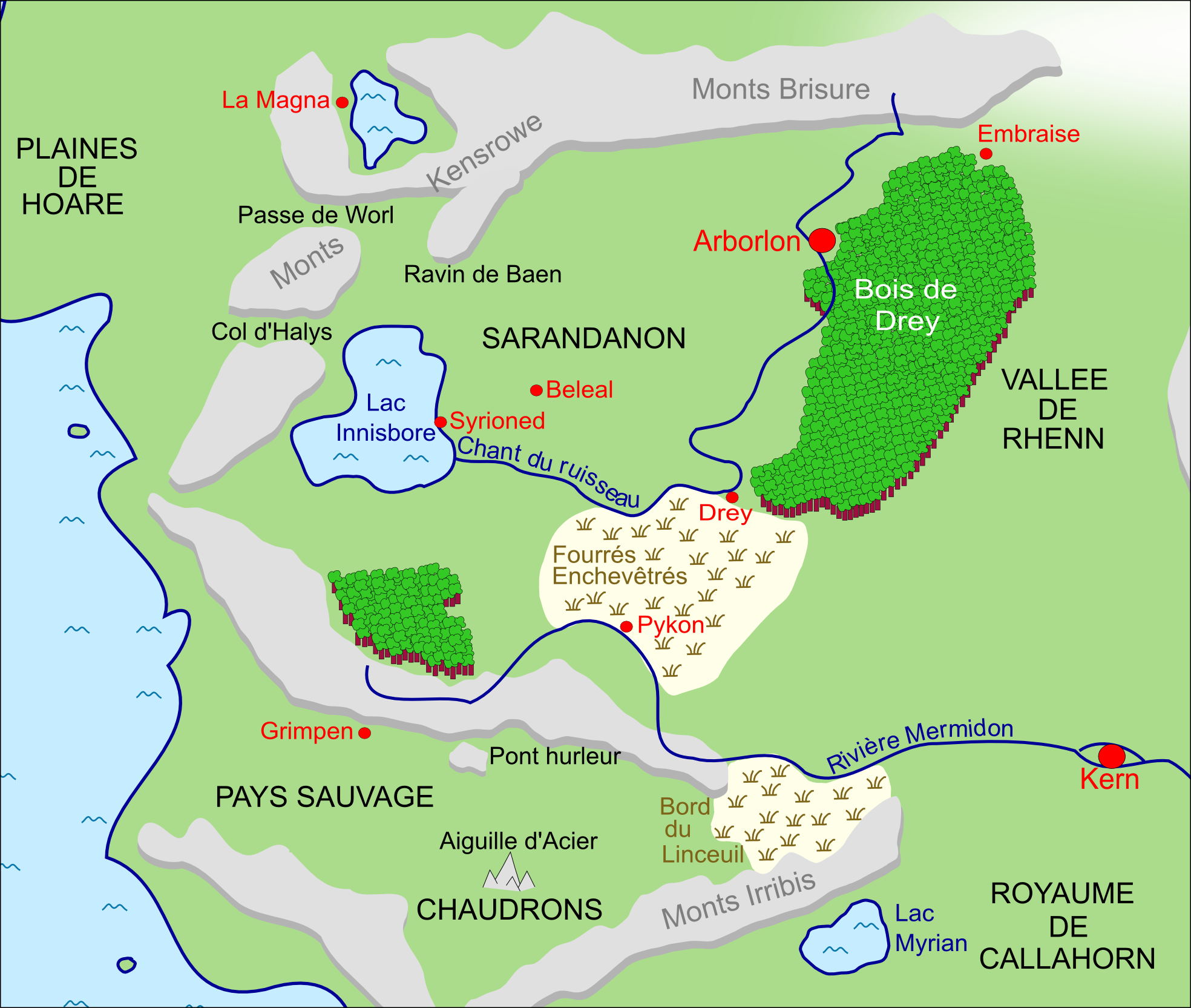 Terres de l'ouest - Shannara version 2